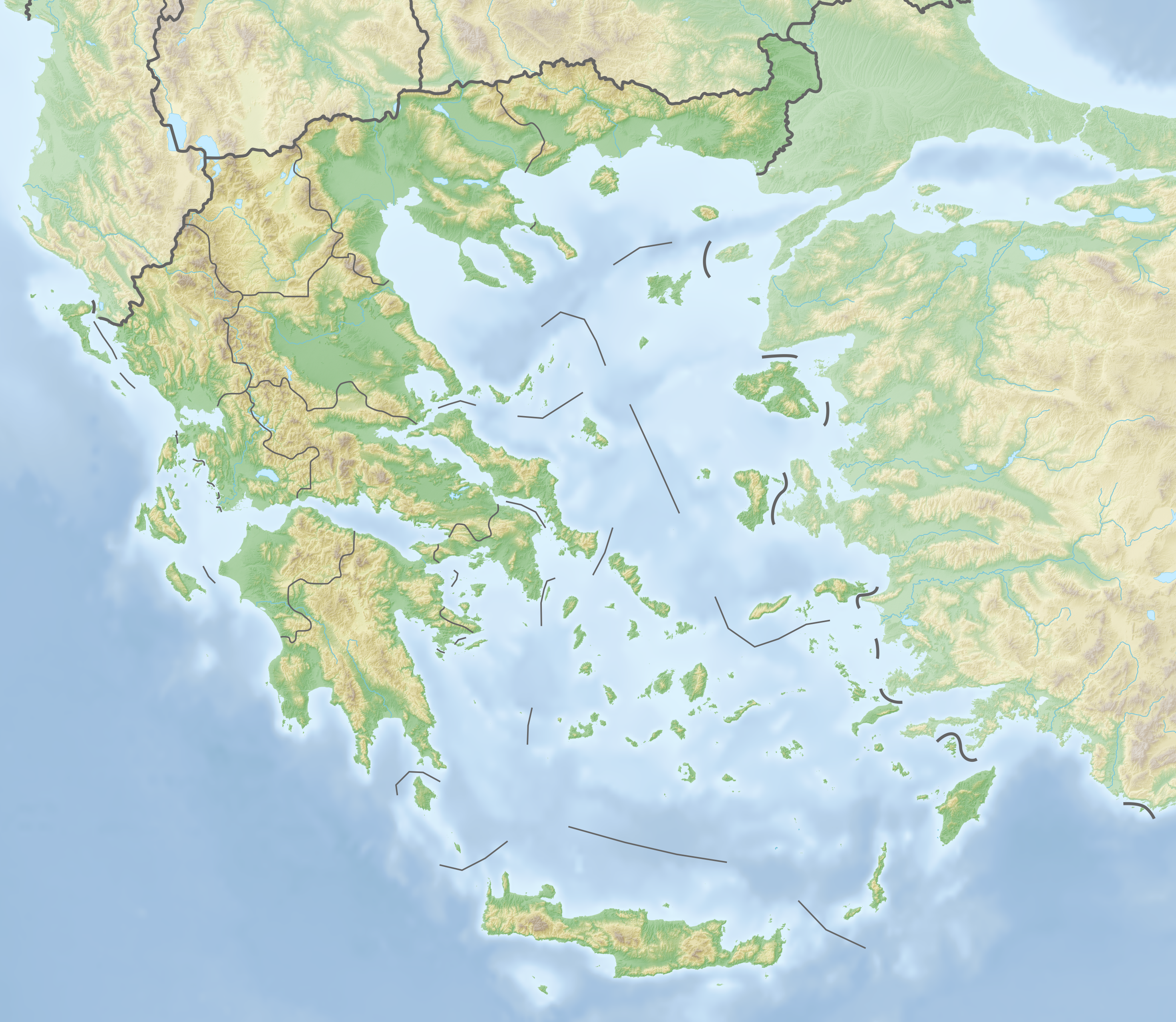 Reliefkarte Griechenland Topographischer Hintergrund: NASA Shuttle Radar Topography Mission (public domain). SRTM3 v.2. Grenzverläufe: File:Greece location map.svg